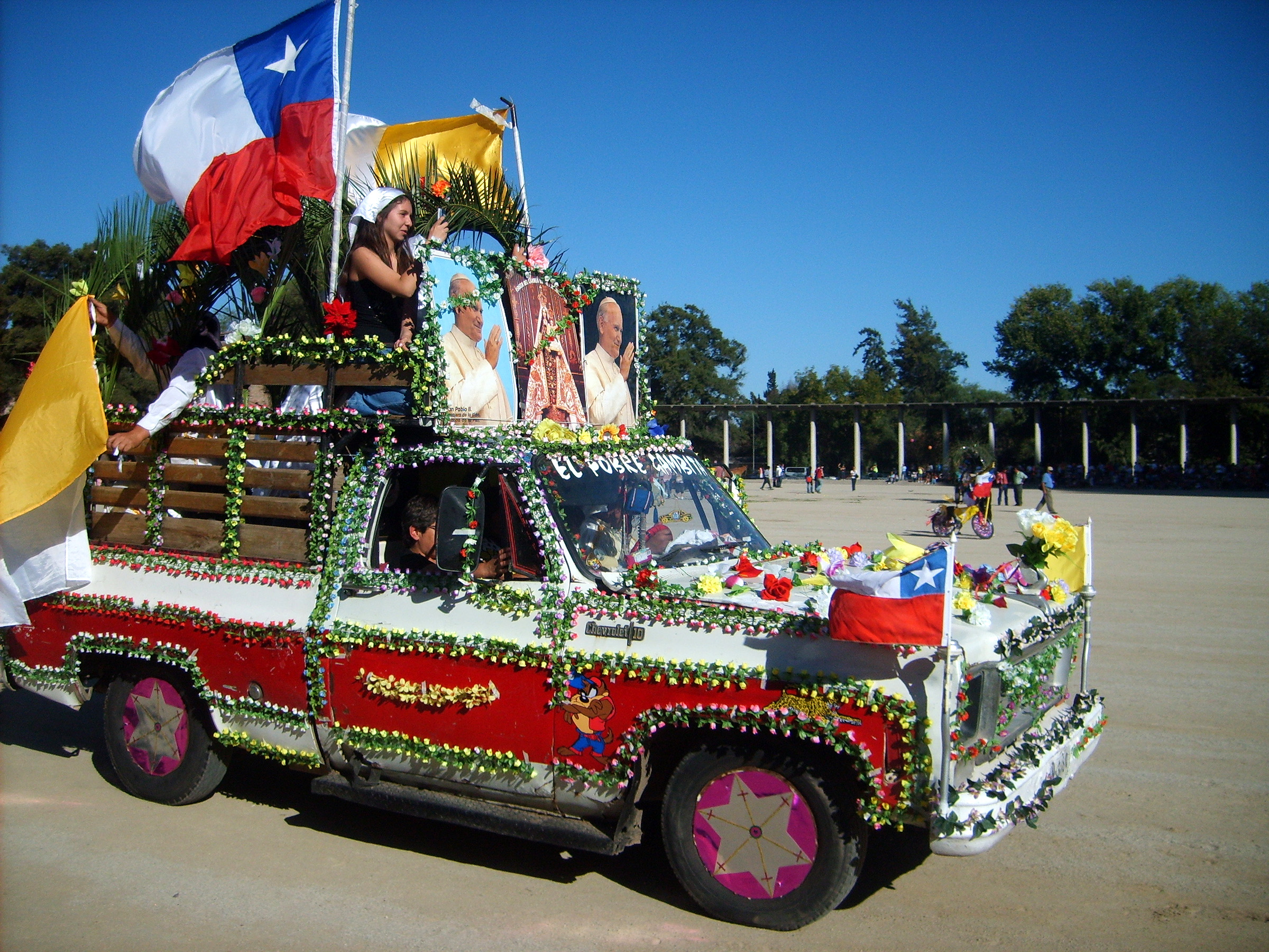 Uno de los carros alegóricos participantes del Cuasimodo, llegando al Templo Votivo de Maipú el 30 de marzo de 2008. Santiago de Chile.